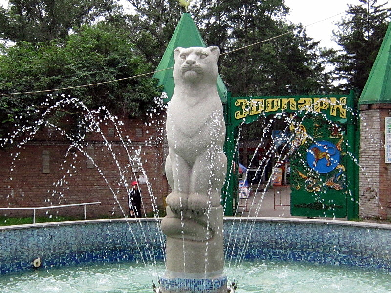 Фонтан у входа в зоопарк.